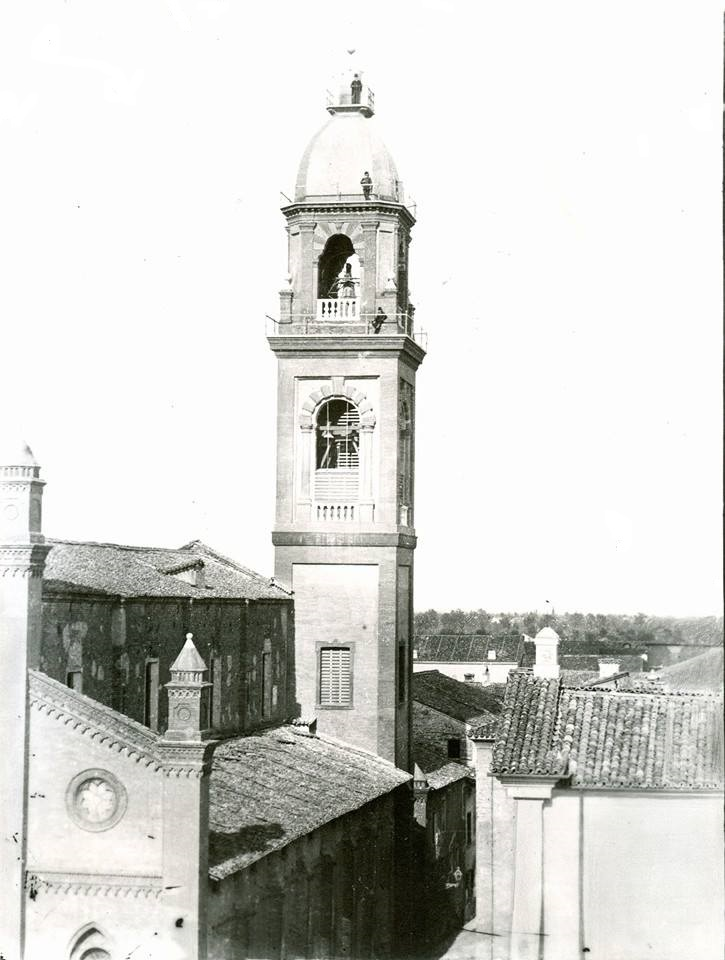 Campanile del Duomo di Mirandola dopo il completamento dei lavori del 1889